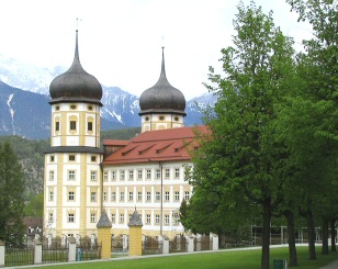 Klášter byl založen roku 1273 tyrolským hrabětem Menhardem II. a jeho manželkou Alžbětou, vdovou po římském králi Konrádovi IV. Mateřským klášterem nového konventu byl švábský Kaisheim z morimondské filiační řady.